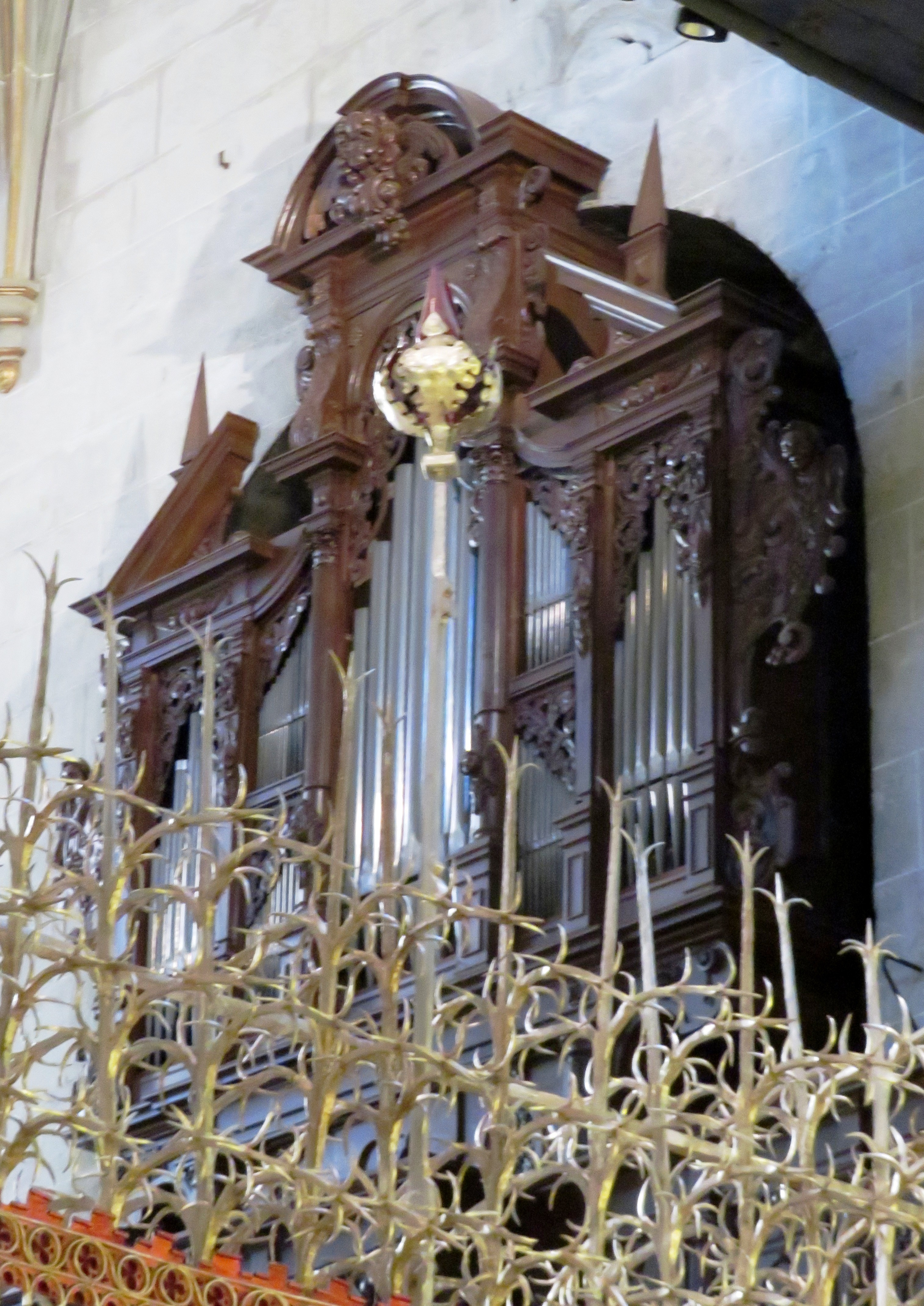 Zoom der Chororgel von Sebald Manderscheidt in der Kathedrale St. Nikolaus in Freiburg im Üechtland, Schweiz.